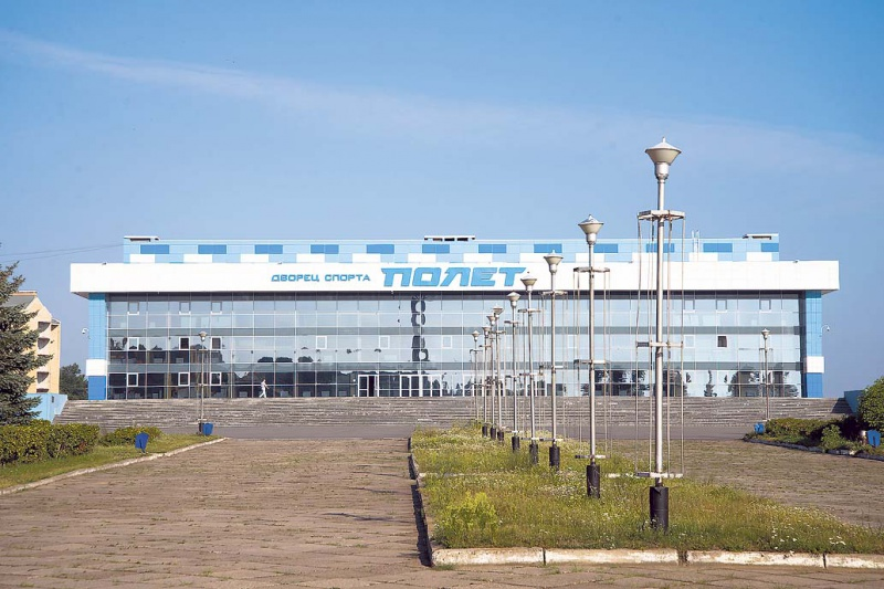 дворец спорта